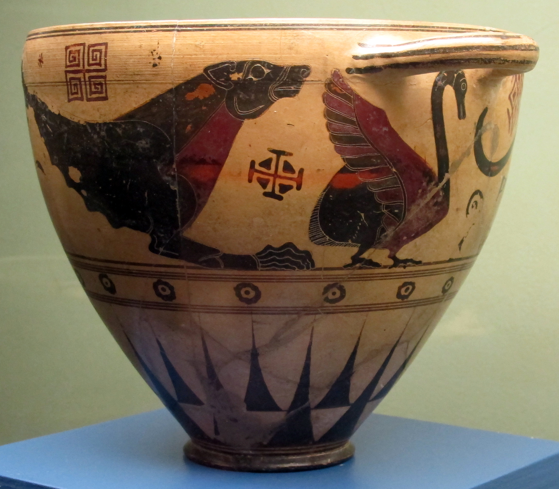 Museo archeologico di Firenze